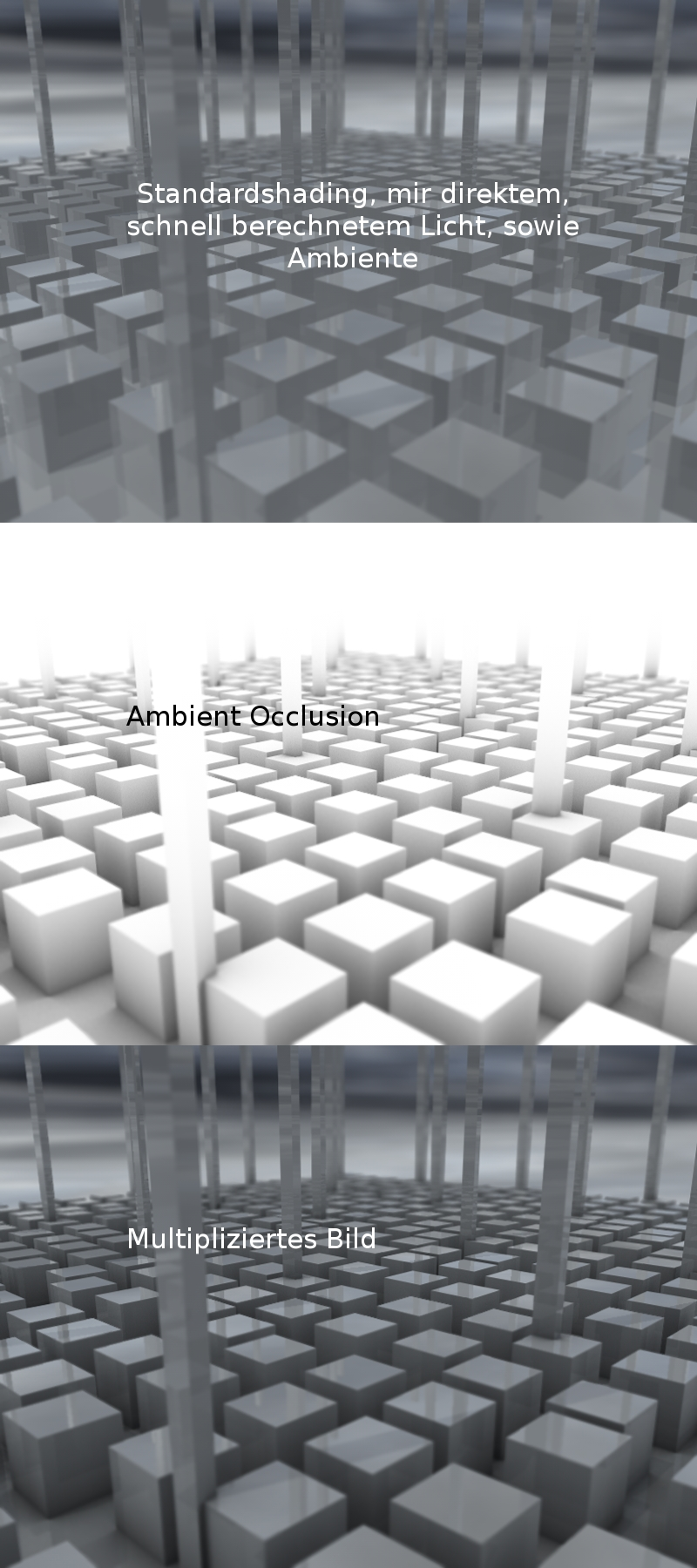 Zeigt ein praktisches Anwendungsbeispiel für Ambient Occlusion Sonstiges: Wurde extra für die Wikipedia erstellt, insbesondere für den deutschen Artikel "Ambient Occlusion"